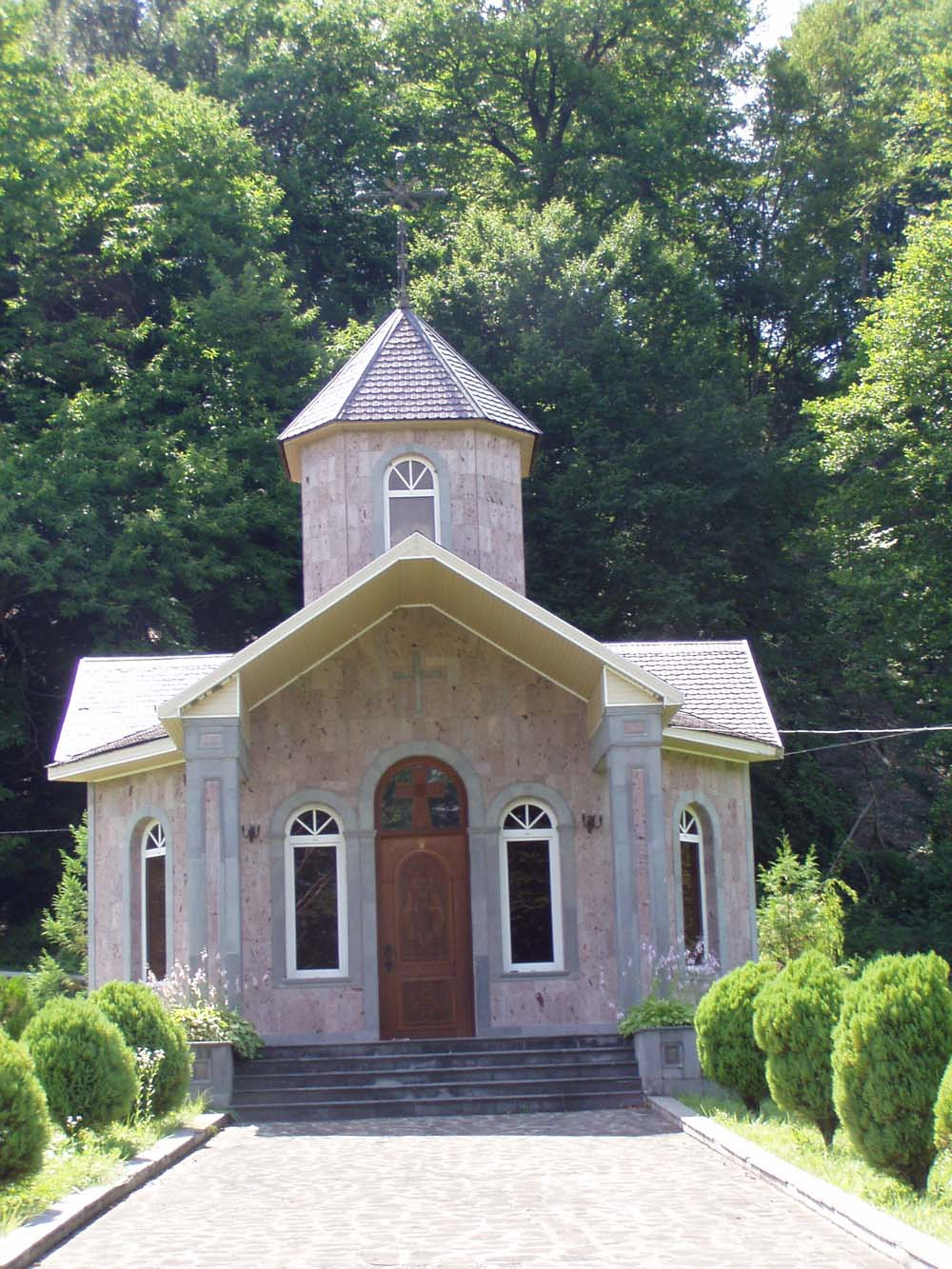 Часовня прихода Святой Нино на Верхнепластунском кладбище, Пластунка, Хостинском районе города Сочи